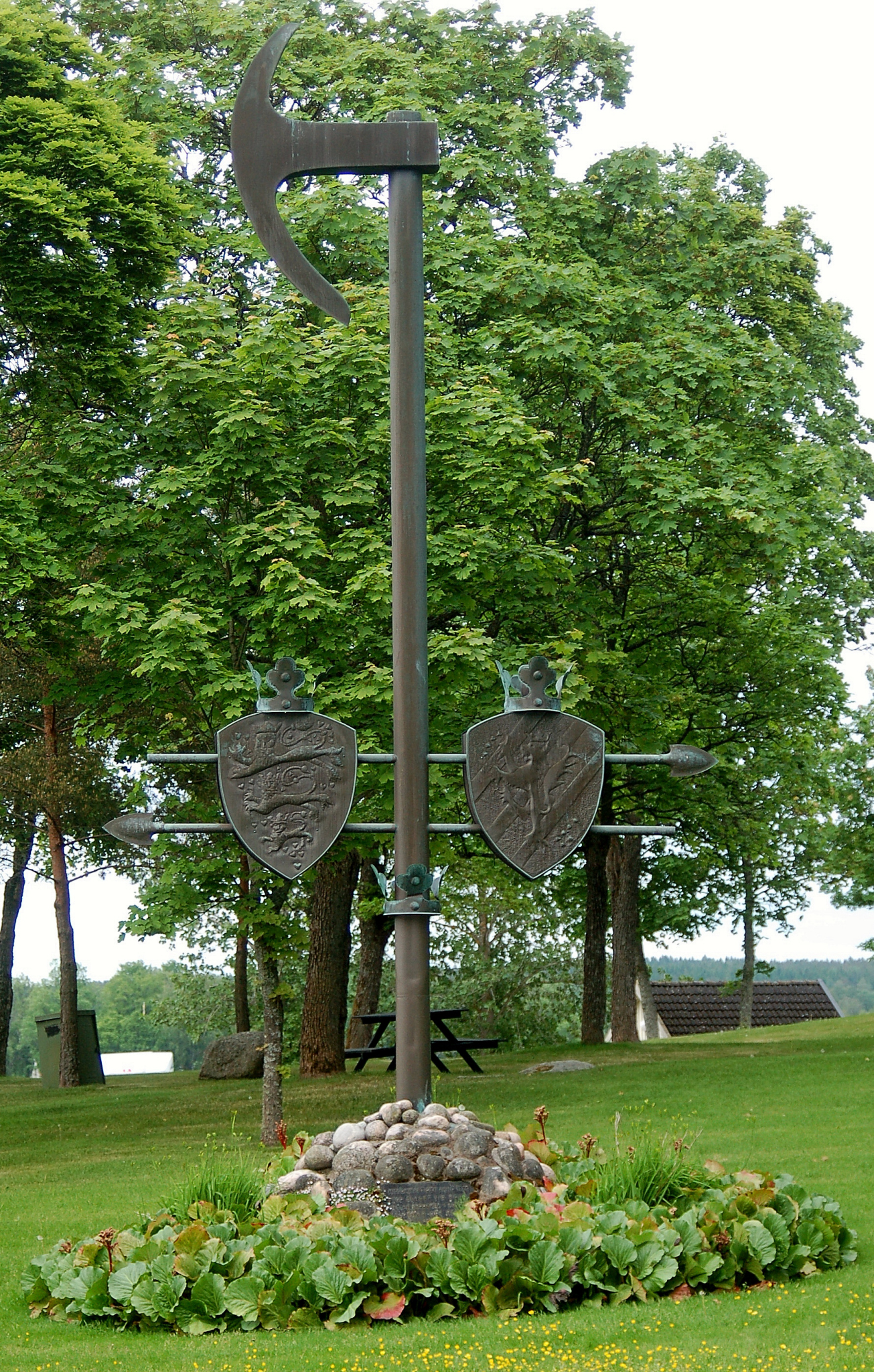 Riddarmonumentet i Hova i Västergötland i Sverige. Citat av texten vid monumentet: "Midsommartiden anno 1275 stod slaget vid Hova mellan bröderna - Konung Valdemar och Hertig Magnus. Segrare blev Magnus som därmed blev konung över Sverige. Hans minne lever såsom Ladulås. Minnesmärket invigt 700 år senare av Konung Carl XVI Gustaf 1975." På baksidan av monumentet finns Carl XVI Gustafs namnteckning och invigningsdatumet 13 maj 1975.